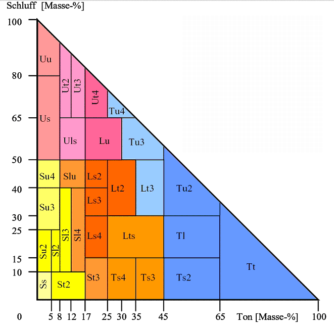 Bodenartendiagramm aus der Bodenkundlichen Kartieranleitung, 5. Auflage (KA5)